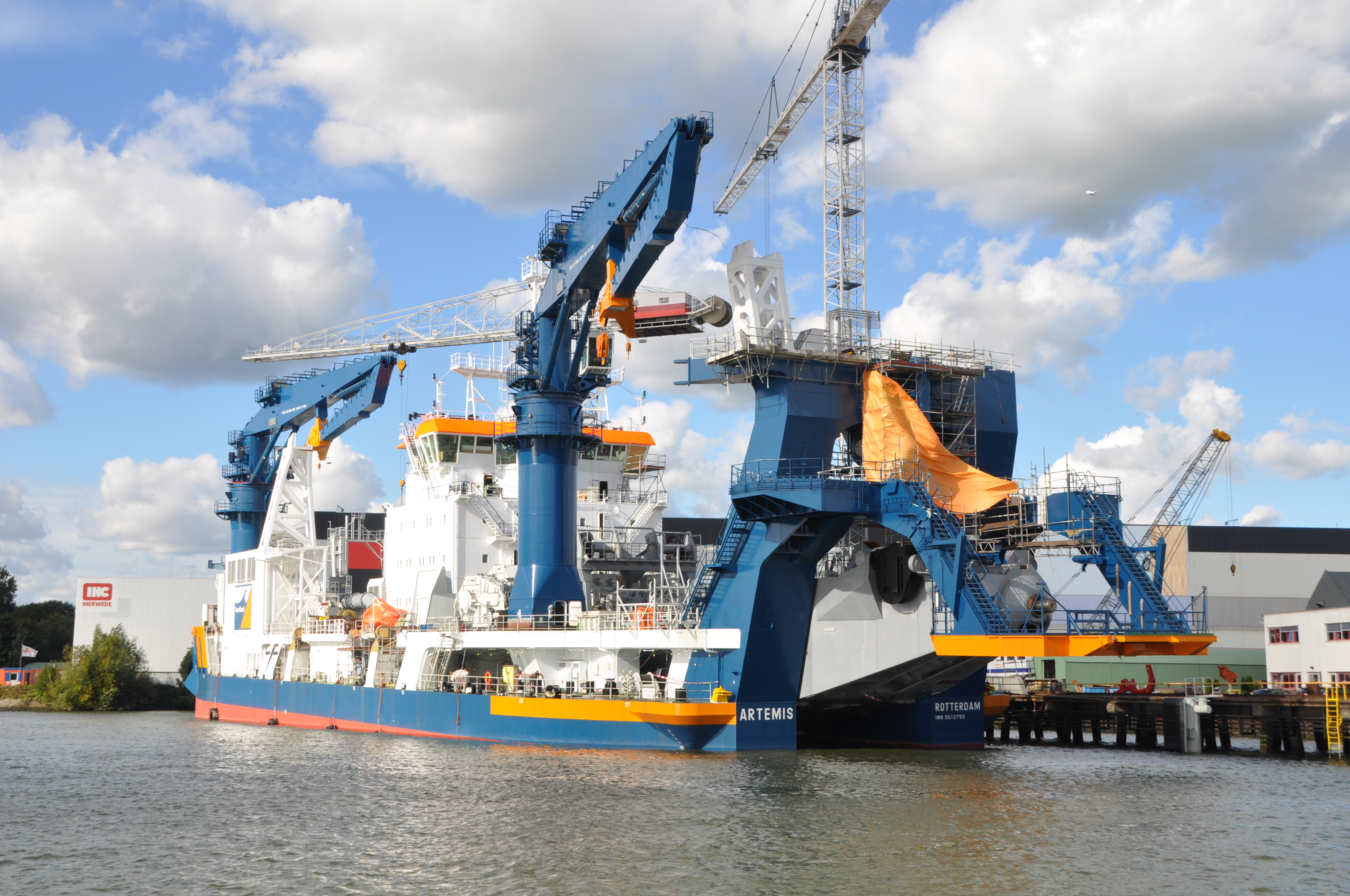 De ARTEMIS in aanbouw voor de wal bij IHC op de Noord